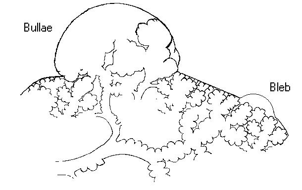 O pneumotÃ³rax espontÃ¢neo primÃ¡rio tem como principal causa a rotura de pequena vesÃ­cula enfisematosa subpleural denominada bleb, ou a rotura de bolha enfisematosa subpleural denominada bullae.